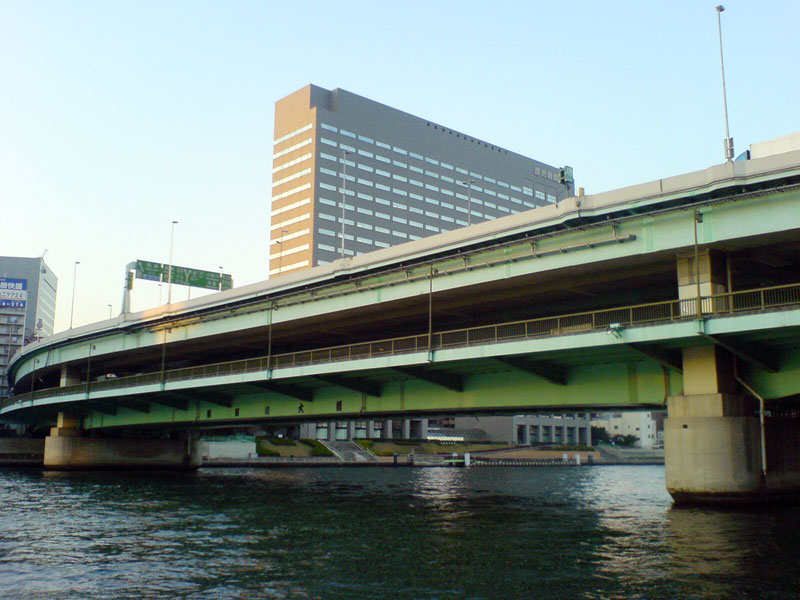 Sumidagawa-Ohashi bridge